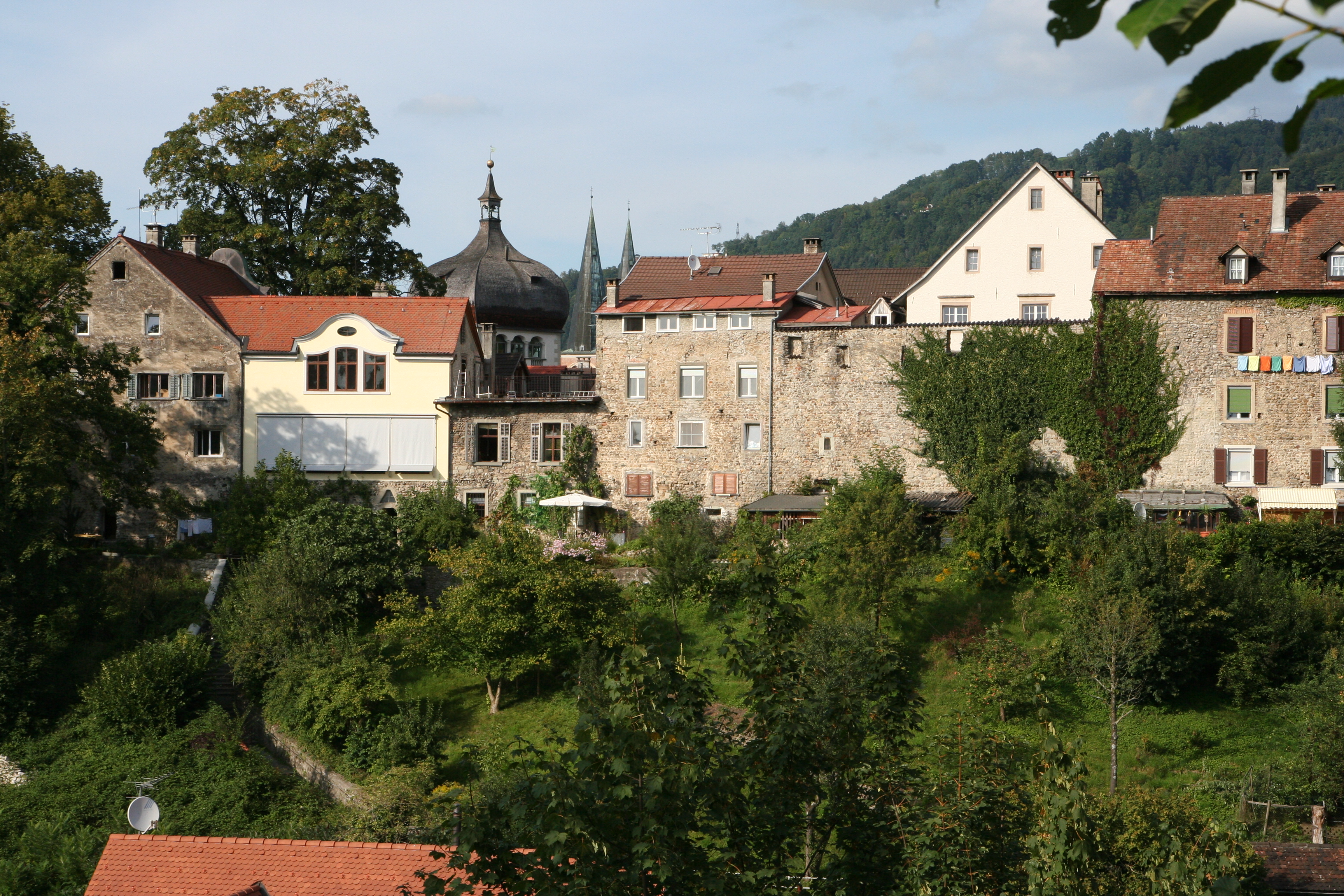 Bregenz, view on the Oberstadt